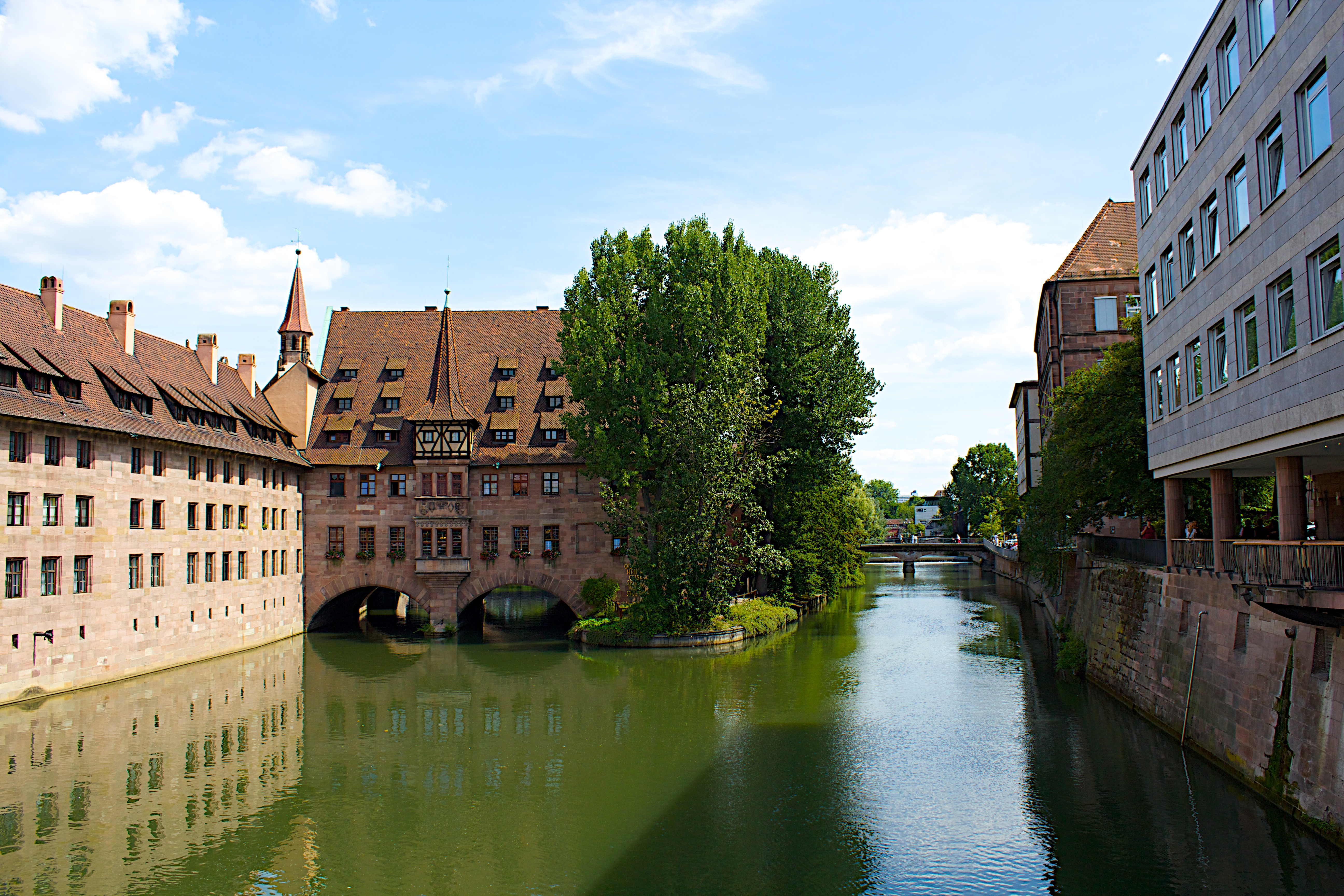 Nürnberg: Blick von der Museumsbrücke auf die Pegnitz und das Heilig-Geist-Spital.